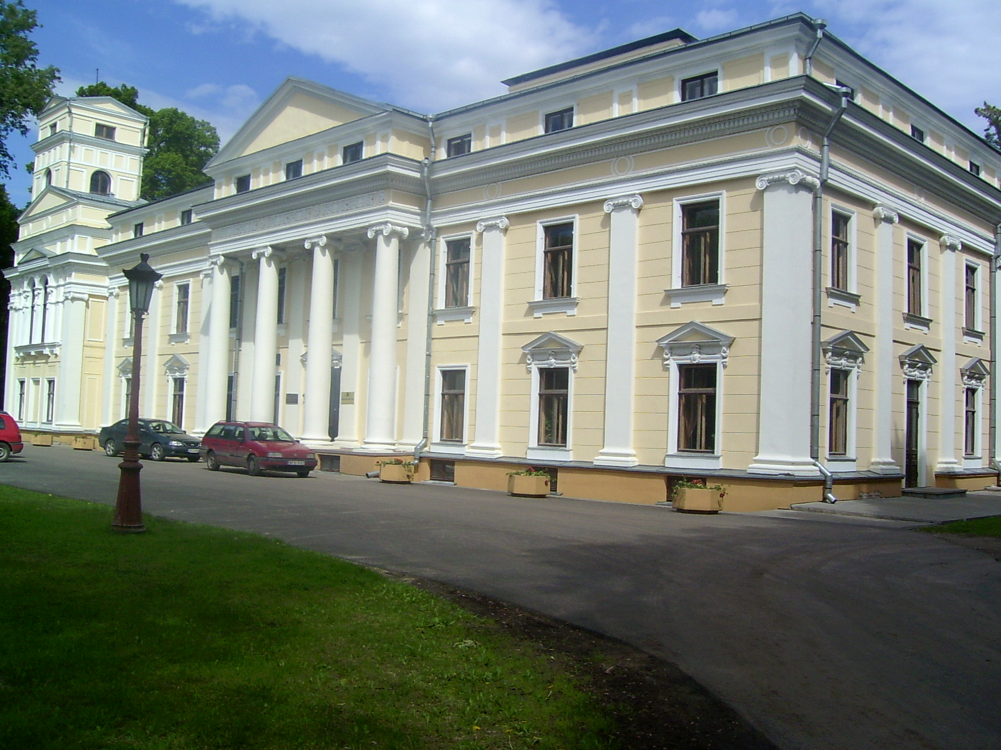 Mokslininkų rūmai Verkių parke, Vilniuje